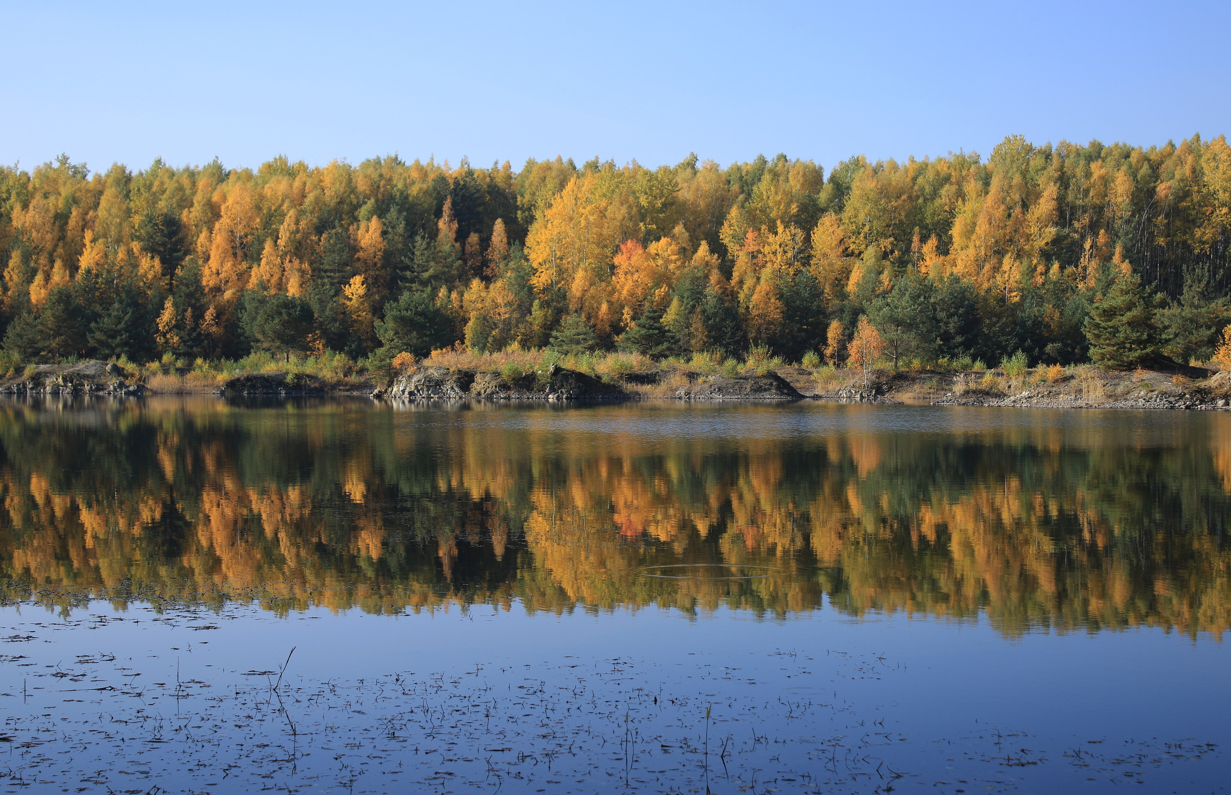 See der ehemaligen Nickelgrube, Naturschutzgebiet „Callenberg Nord II“ (NSG C 59) im Landkreis Zwickau, Sachsen